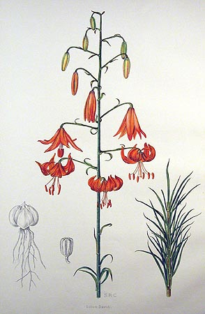 Lilium davidii handcolorierte Lithographie von Henry John Elwes (1846-1922) aus dem Jahre 1877